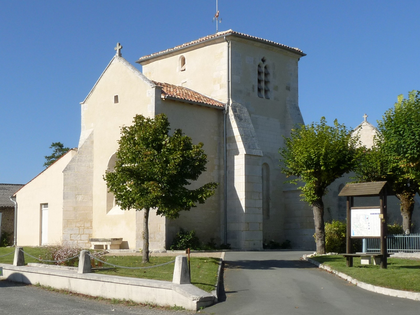 Eglise de St-Martial-sur-Né, Charente-Maritime, France